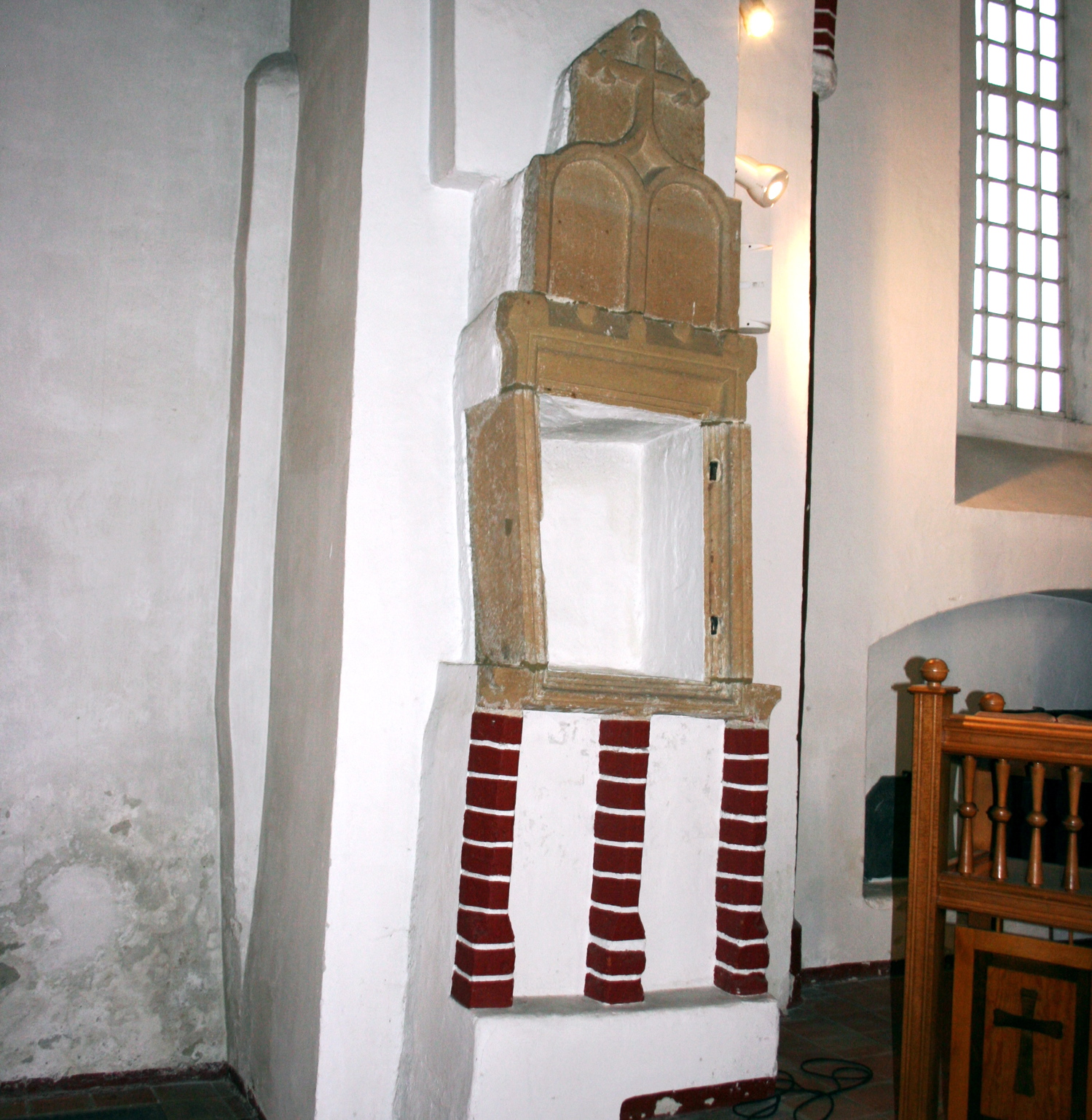 Kreisbahn Aurich Sakramentenschrein Kirche Victorbur